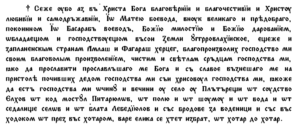 Fragment din hrisovul de ctitor a lui Matei Basarab cu dania pentru Mănăstirea Plătăreşti de la 1646. Fragmentul reprezintă transcrierea textului în limba slavonă, după documentul original.